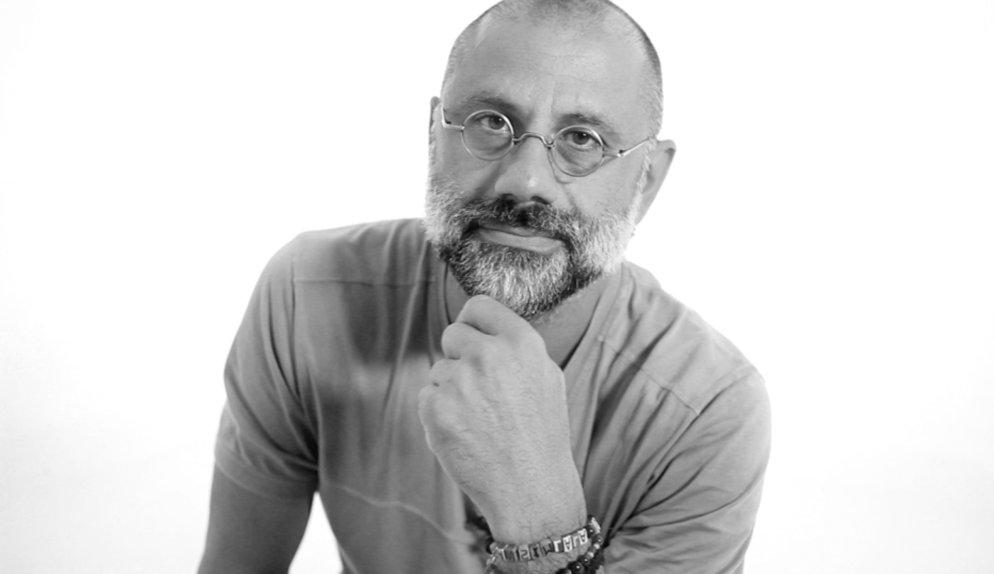 Semih Yalman